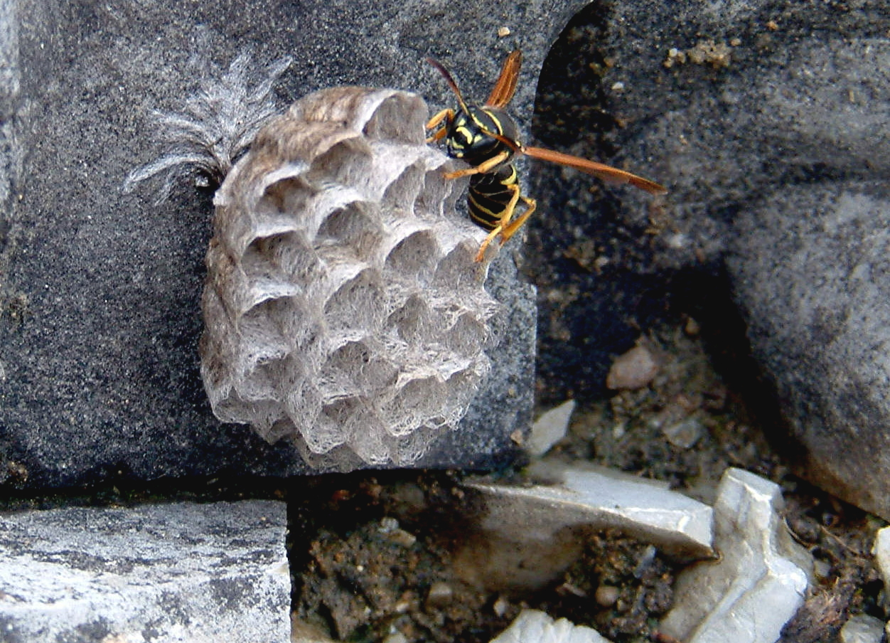 Biosphärenreservat Berchtesgadener Land /Nationalpark Bechtesgaden: Wespennest am Königsbach /Königssee